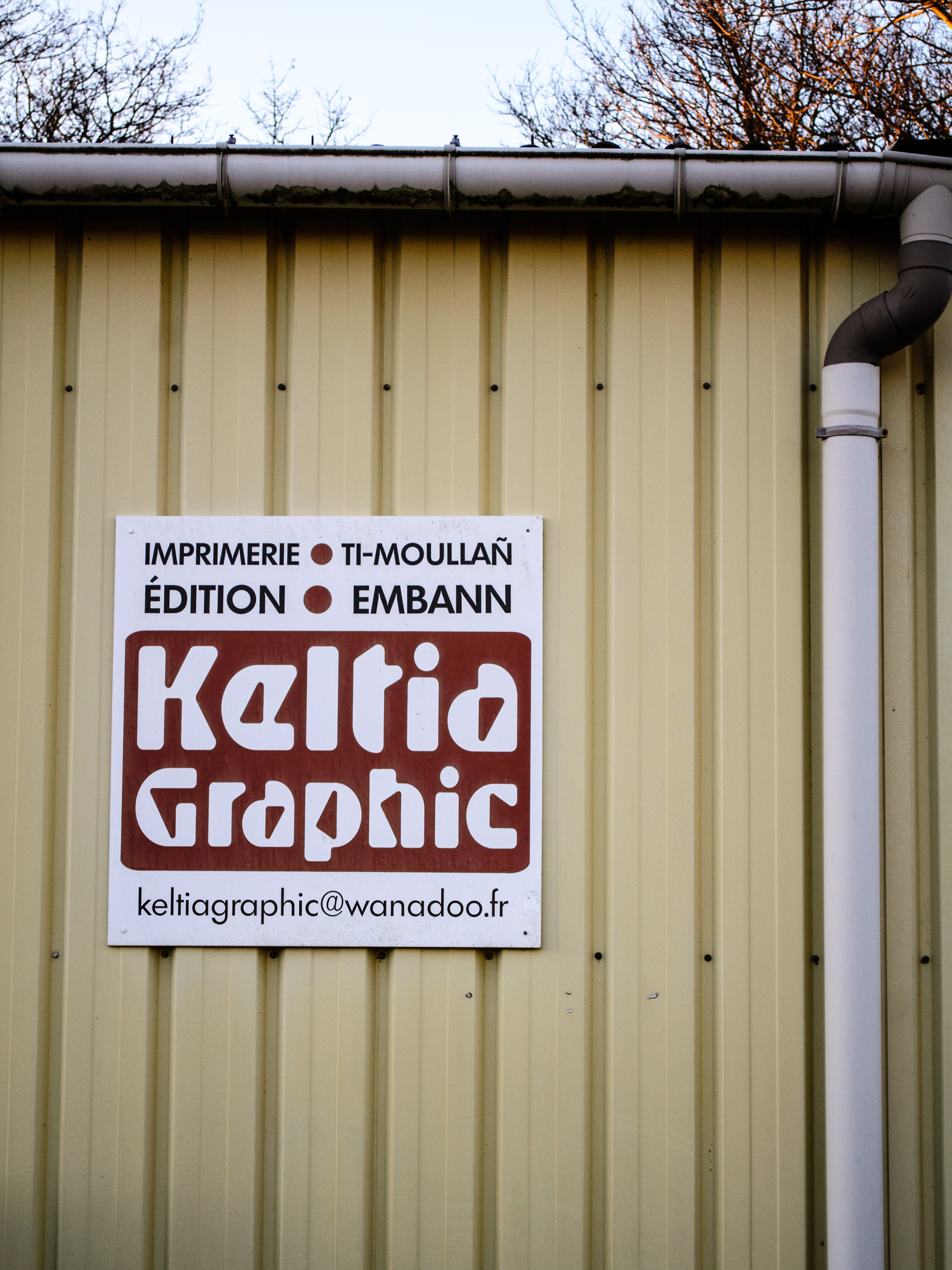 Keltia Graphic, éditeur de livres diffusé par Coop Breizh, basé à Spézet.